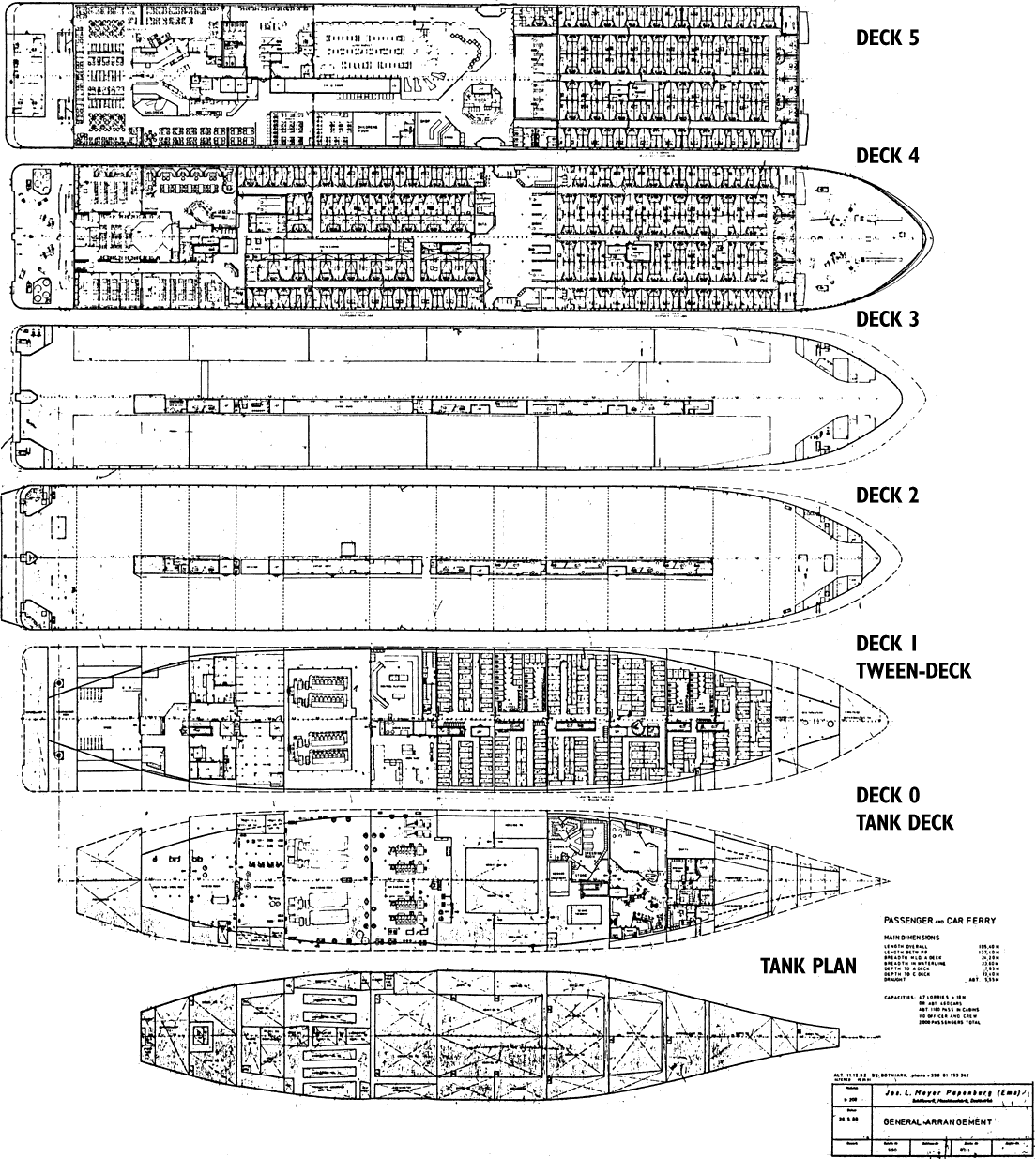 MS Estonia2